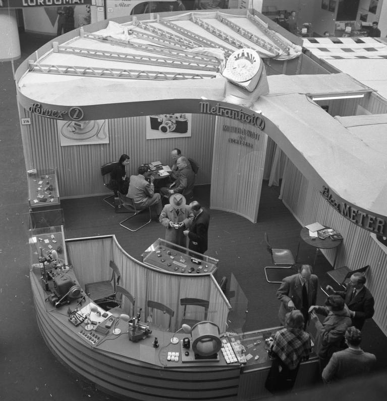 Photokina Köln